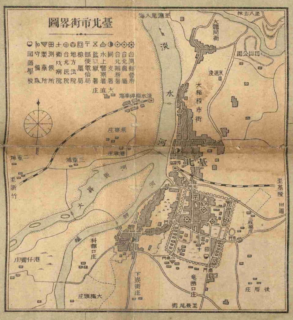 圖中可以看出淡水河、大稻埕市街、臺北城的位置關係